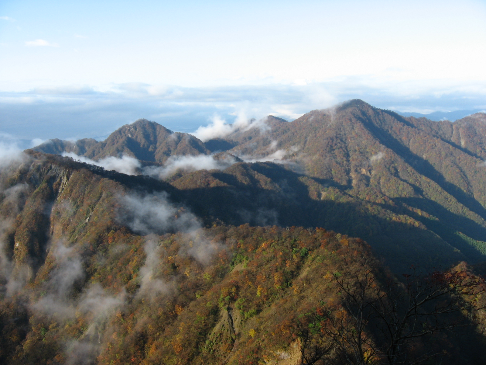 蛭ヶ岳から西南西方向を望む。右に檜洞丸。